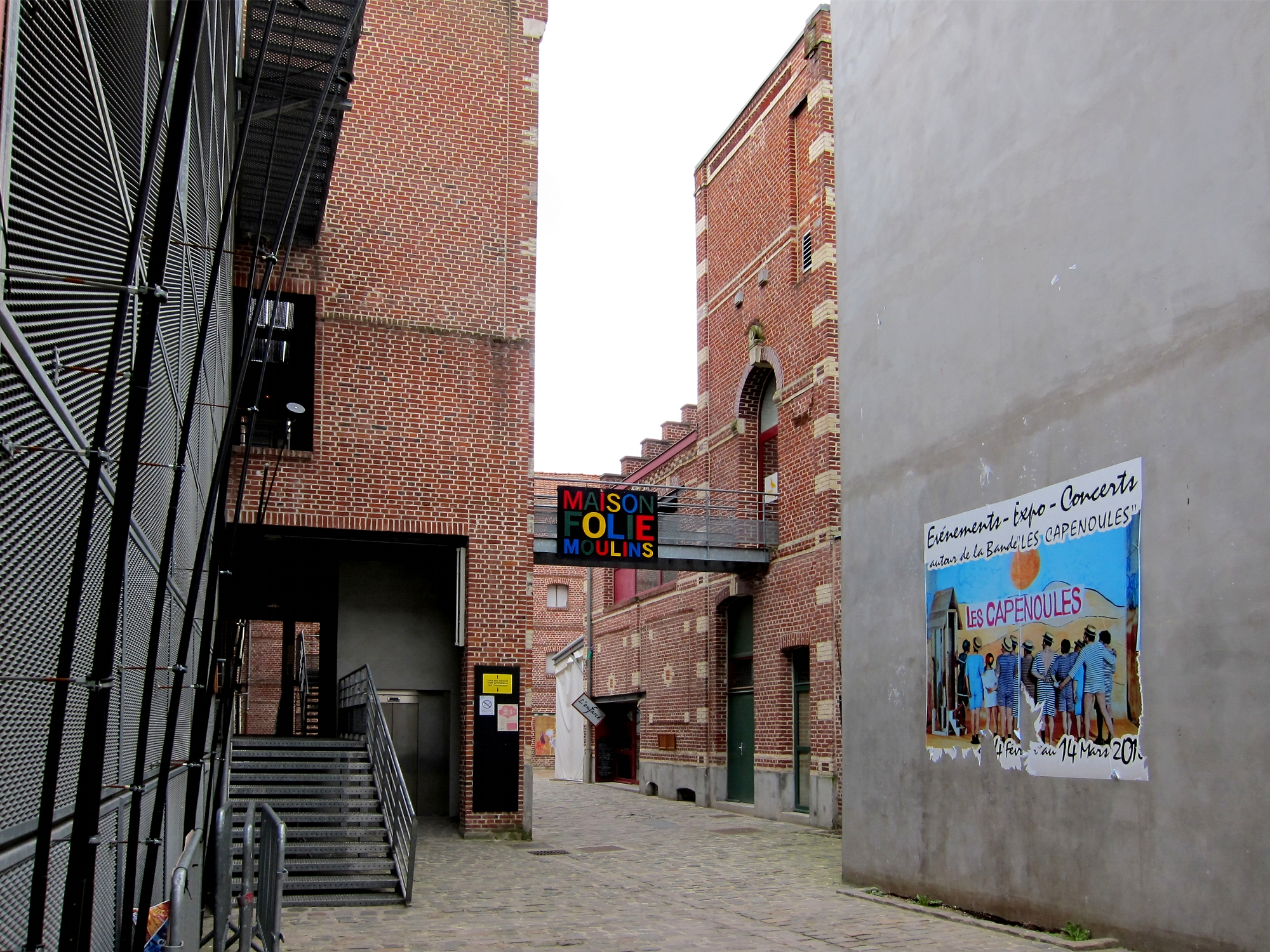 La maison folie de Moulins à Lille (Nord).